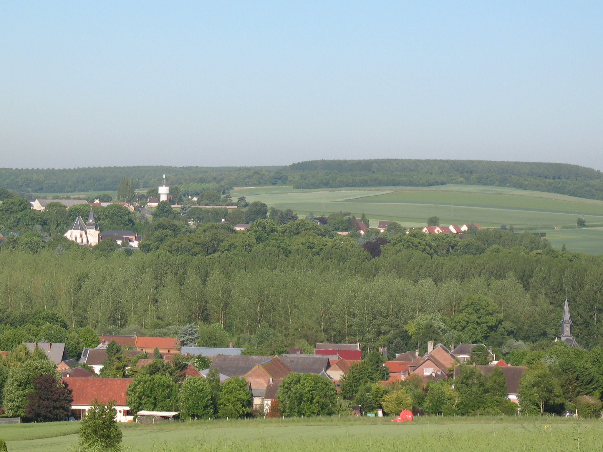 Peupleraie de la vallée de l'Hallue entre Pont-Noyelles et Querrieu, dont on aperçoit les deux églises. En arrière-plan : bois de Querrieu, Allonville et Saint-Gratien.